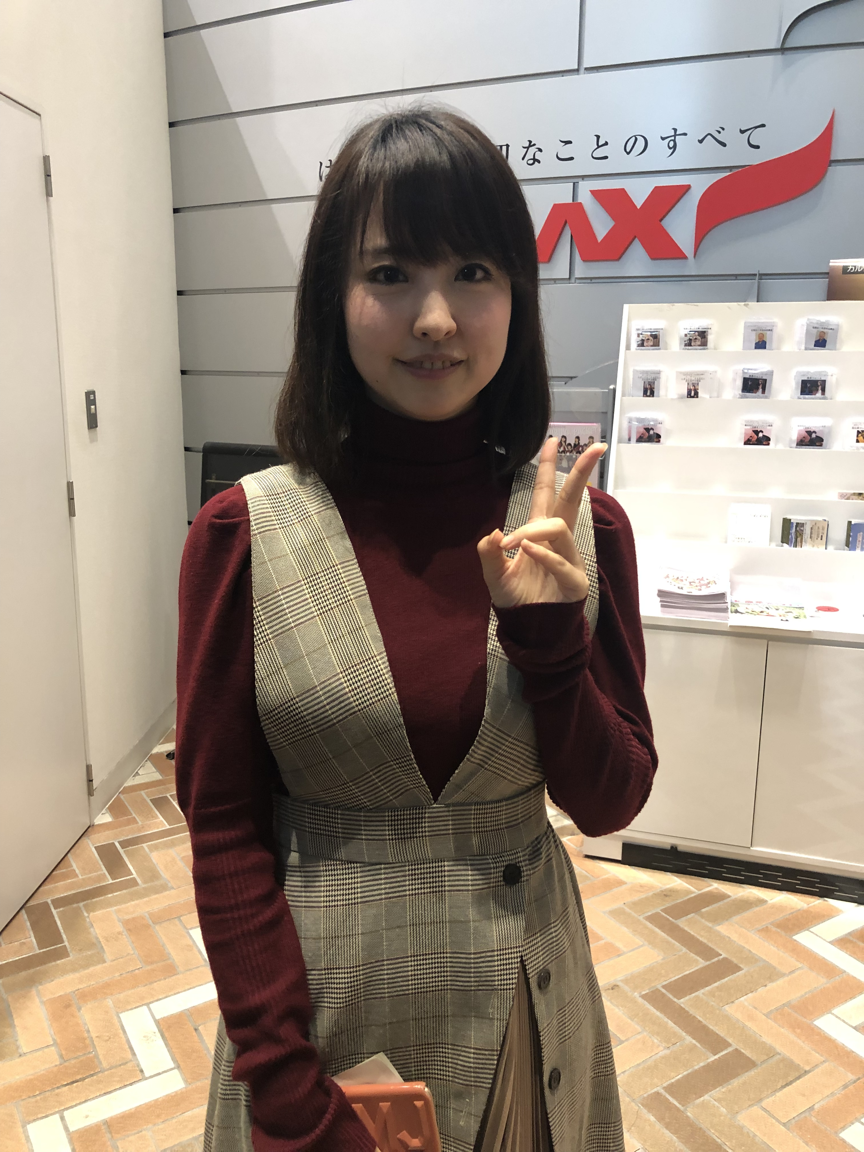 2019.02.22 渋谷クロスFM「水原ゆきのみなラジオ」ゲスト出演